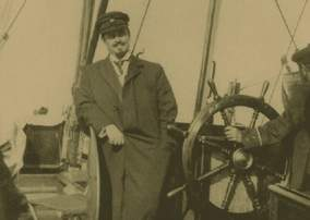 Анатолий Павлович Демидов (1874-1941). Фотография, начало XX в. Из собрания А. Тиссо